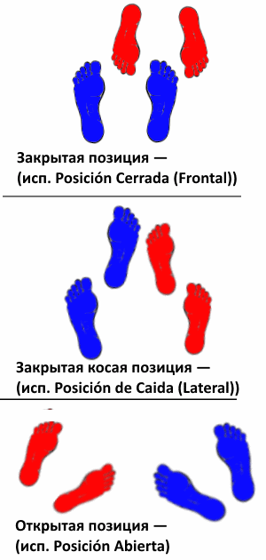 Позиции партнеров в танце Касино на 8 счет. Красным цветом обозначено расположение ступней партнерши. Синим цветом обозначено расположение ступней партнера.